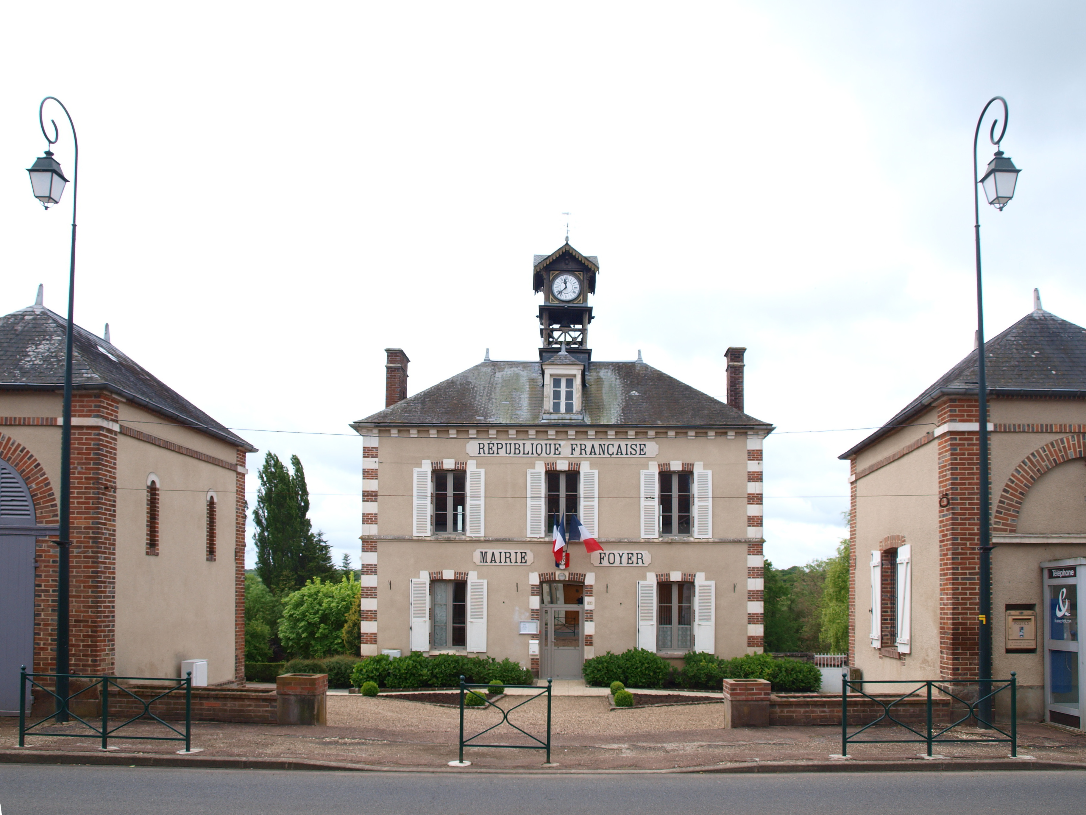 Lavau (Yonne)